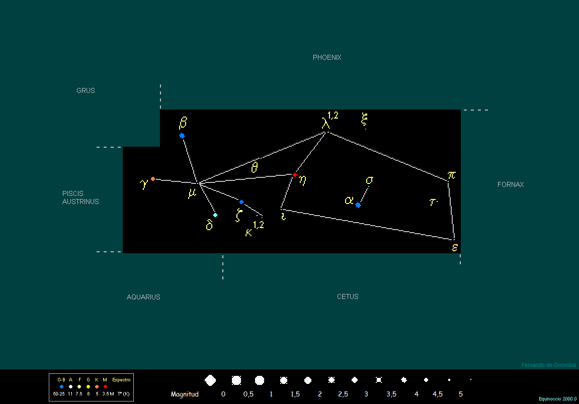 SCULPTOR o el estudio del escultor. Constelación del Hemisferio: SUR.